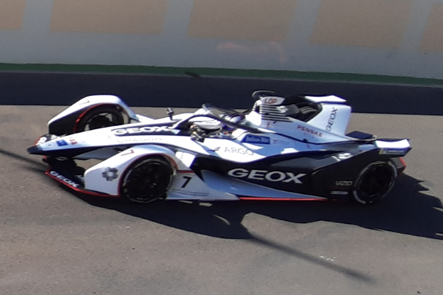 Jóse María López beim Marrakesch E-Prix 2019